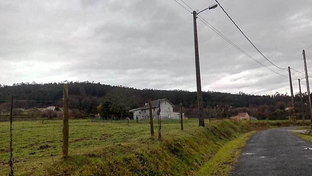 Vista da Pallota, Pedroso, Narón.